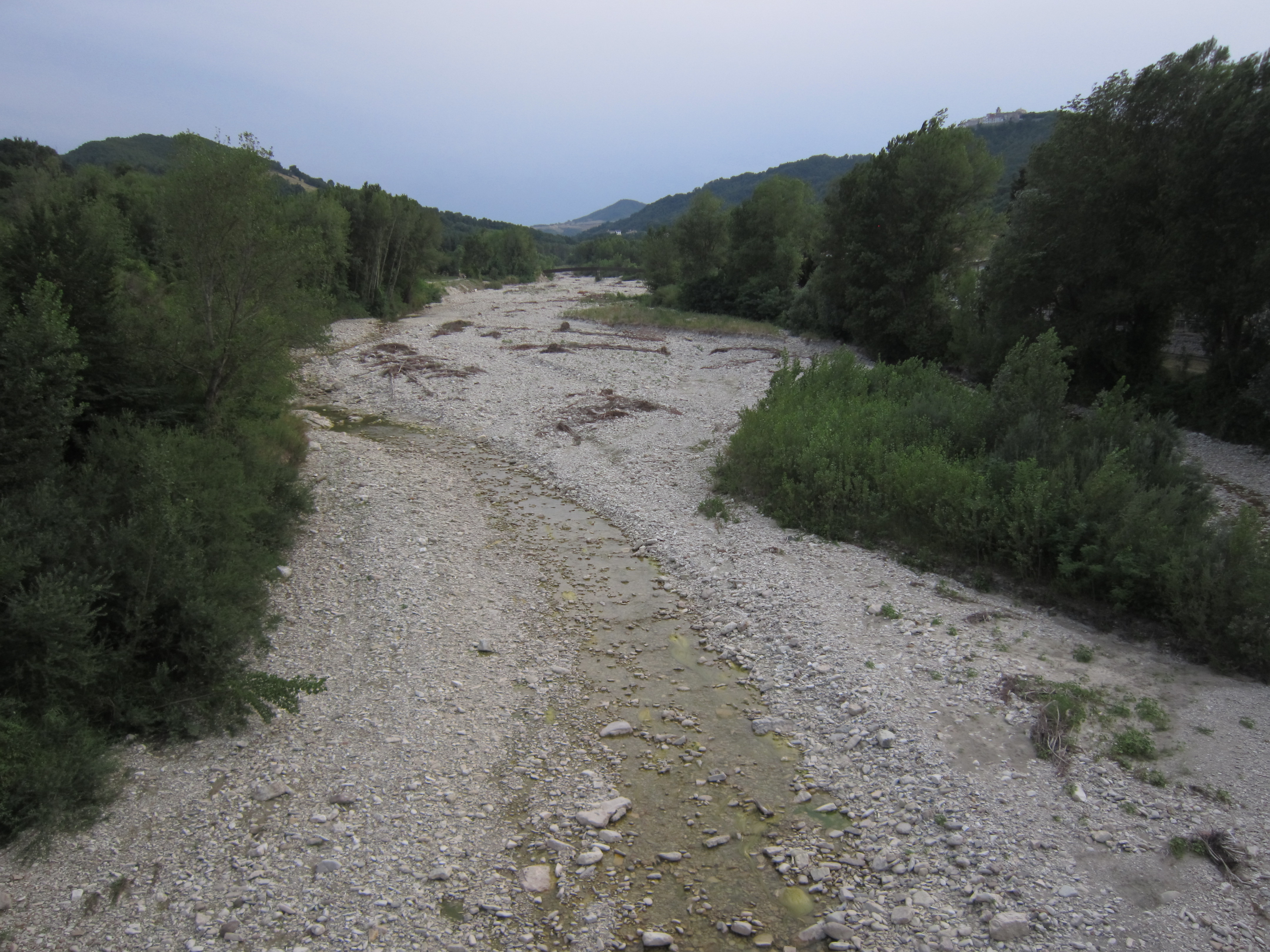 Il fiume Conca presso Mercatino Conca (luglio 2015)